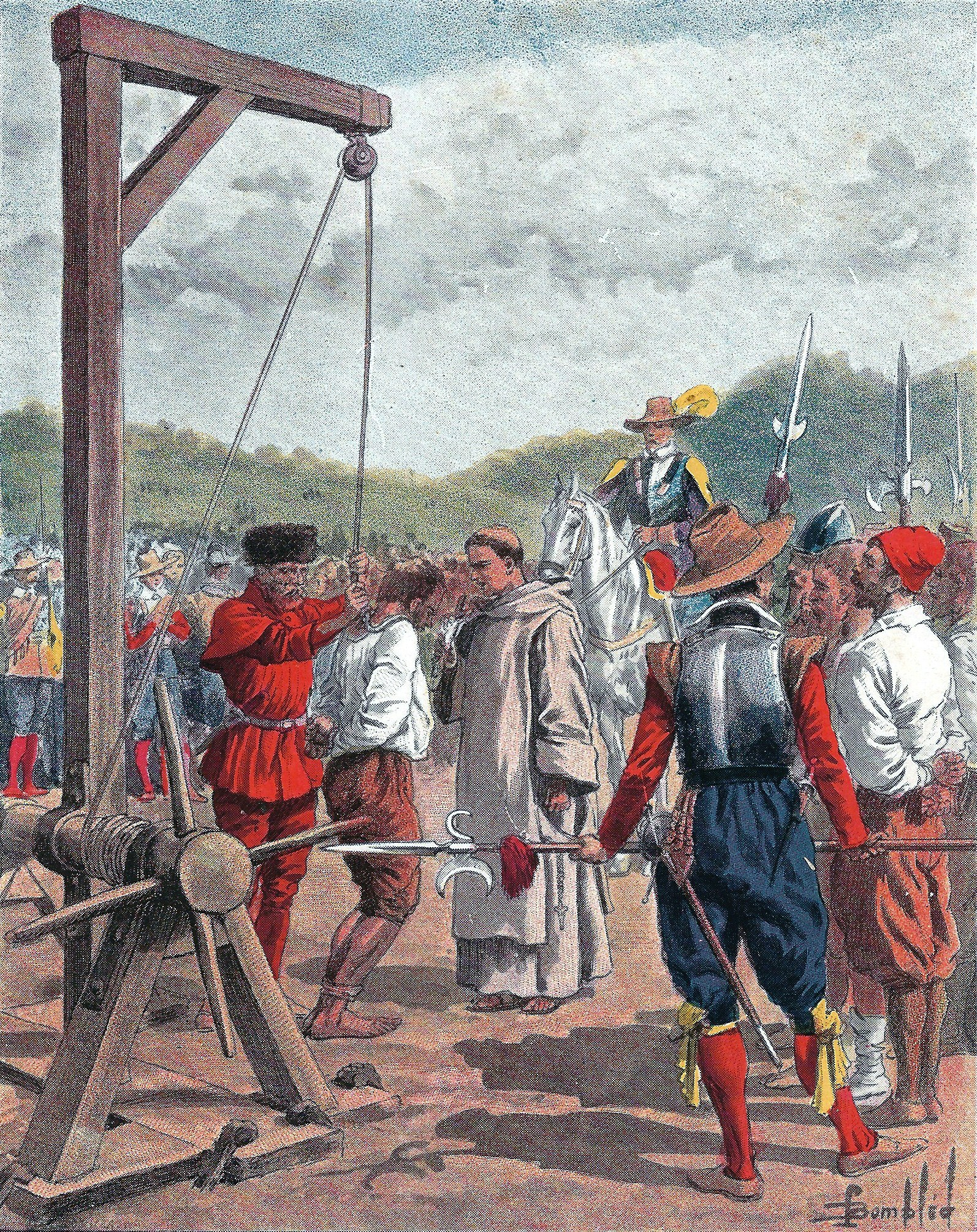 Champlain fait pendre un des conspirateurs Illustration tirée de l'Histoire de la Nouvelle France d'Eugène Guénin